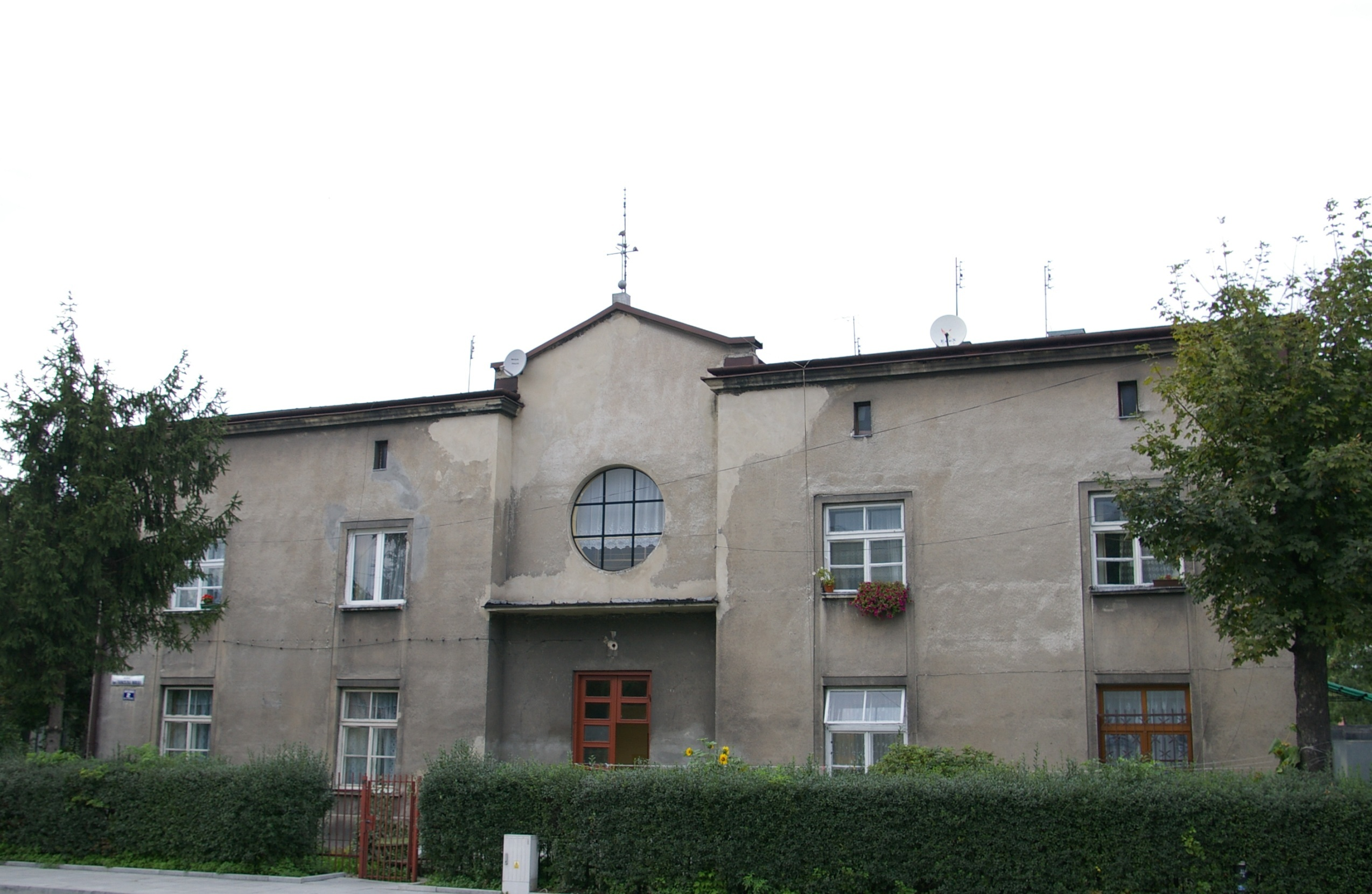 Dawny budynek kurii Polskiego Narodowego Kościoła Katolickiego przy ulicy Hodura 2 w Krakowie